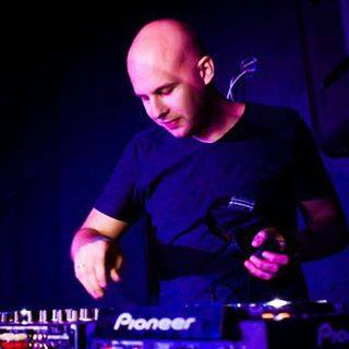 Alexander Popov